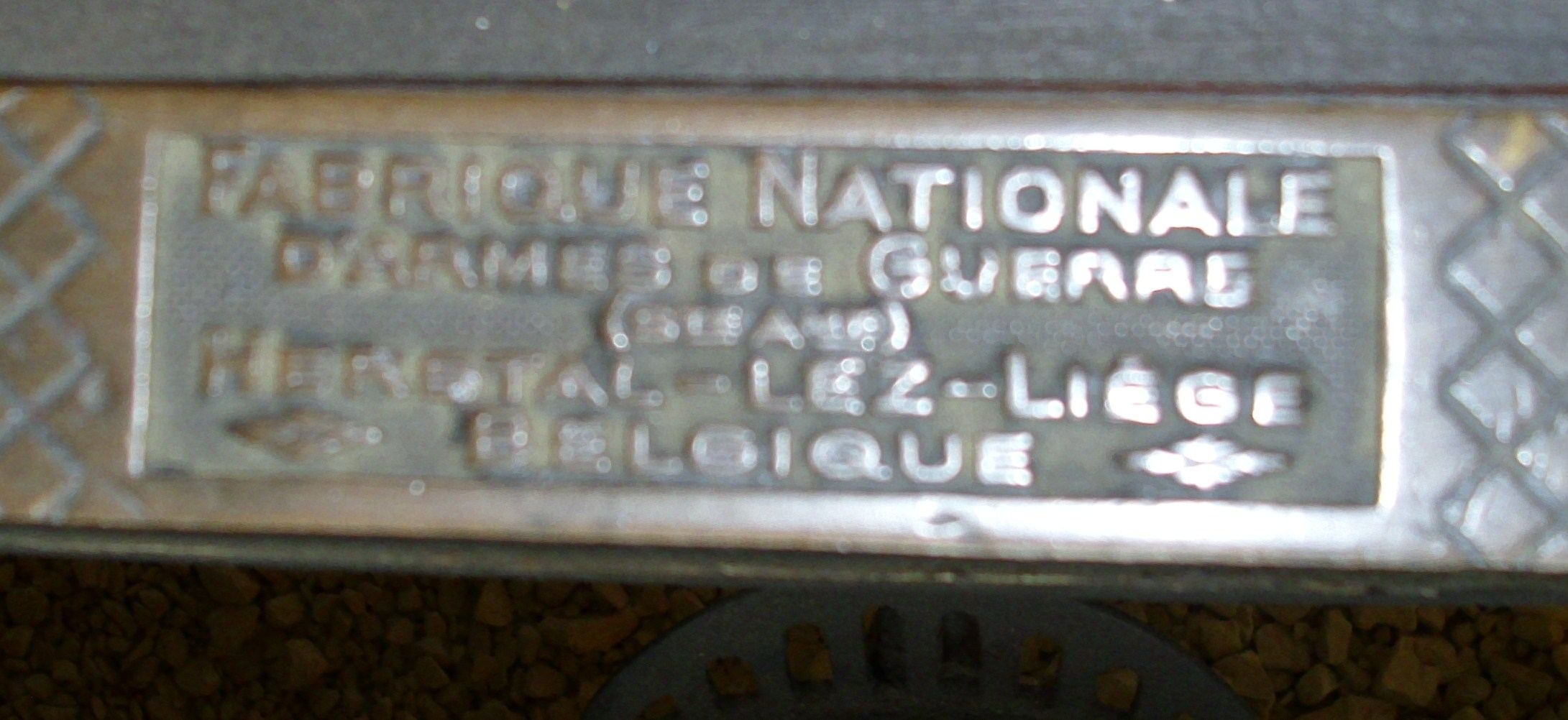 Emblem FN